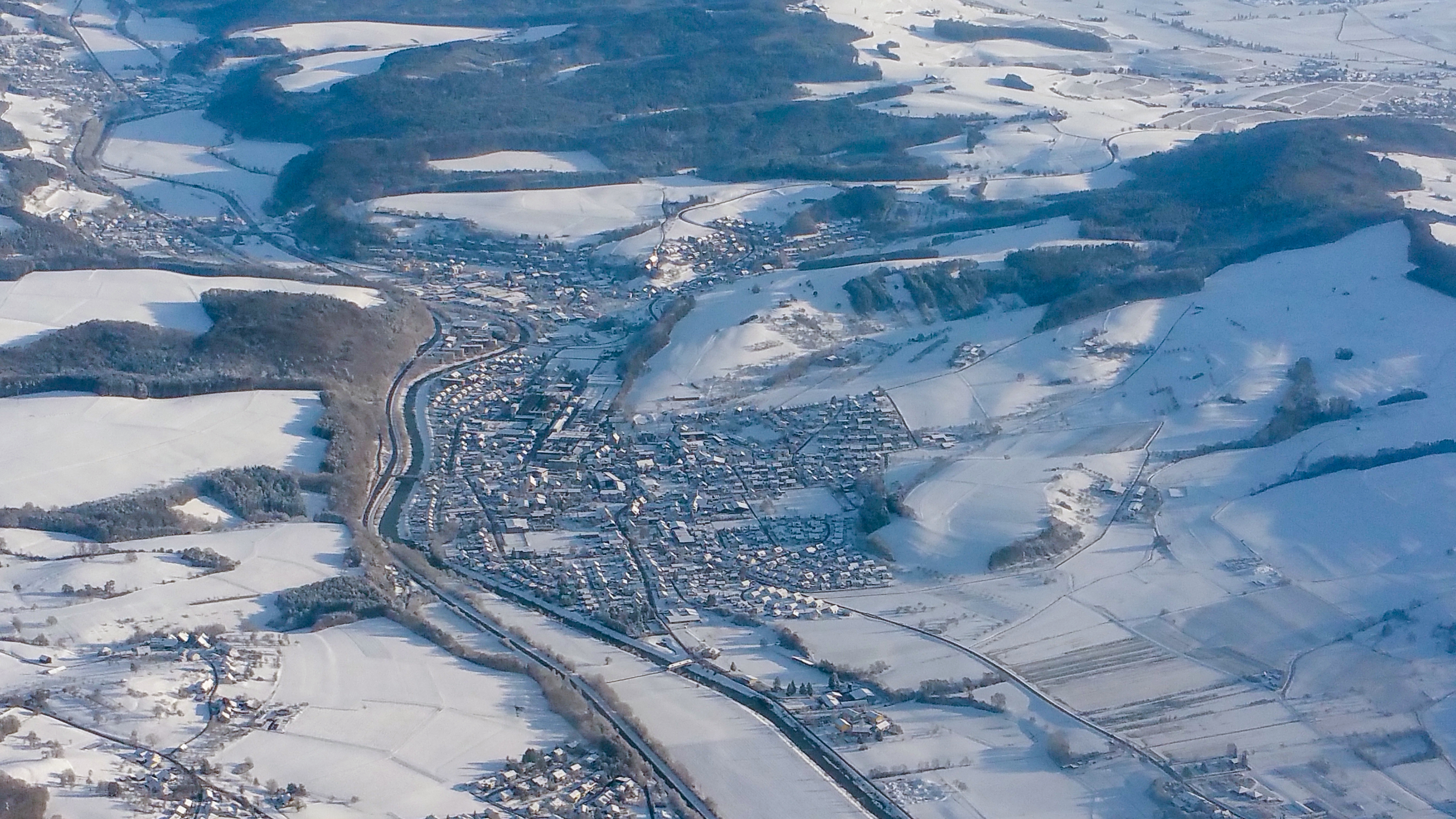 Germany, Baden-Württemberg, approach into ZRH across the Southern part of Black Forest. ACHTUNG: Entgegen der Bildbenennung handelt es sich hier um Wutöschingen.